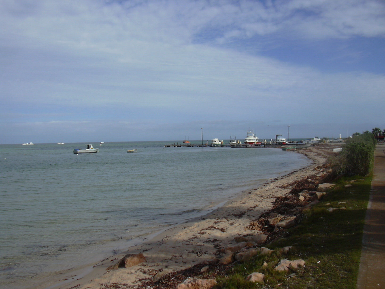 Denham Harbour, Shark Bay/Western Australia